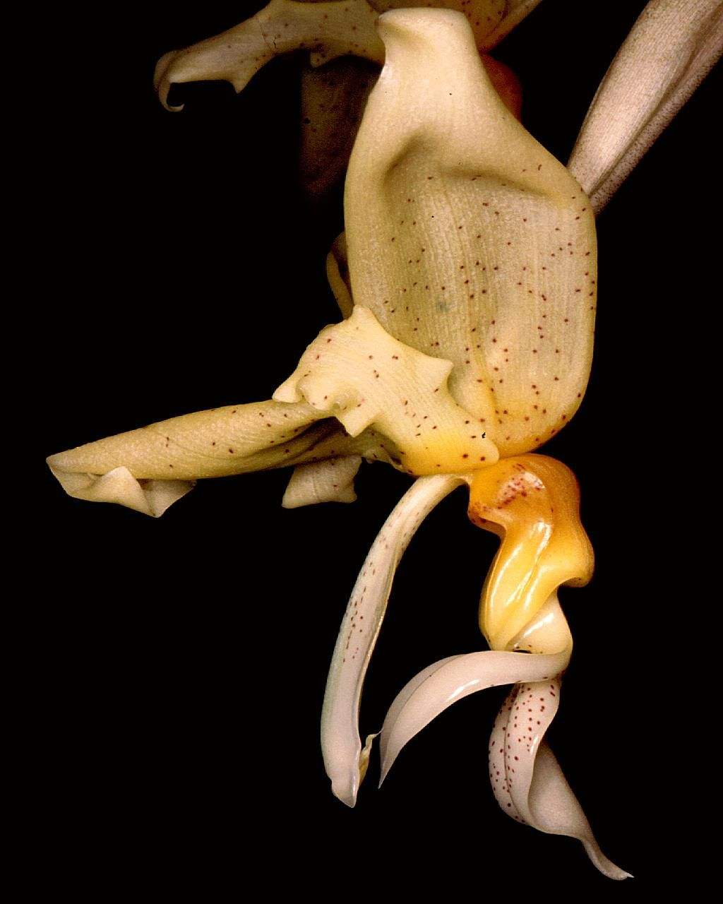 Stanhopea graveolens